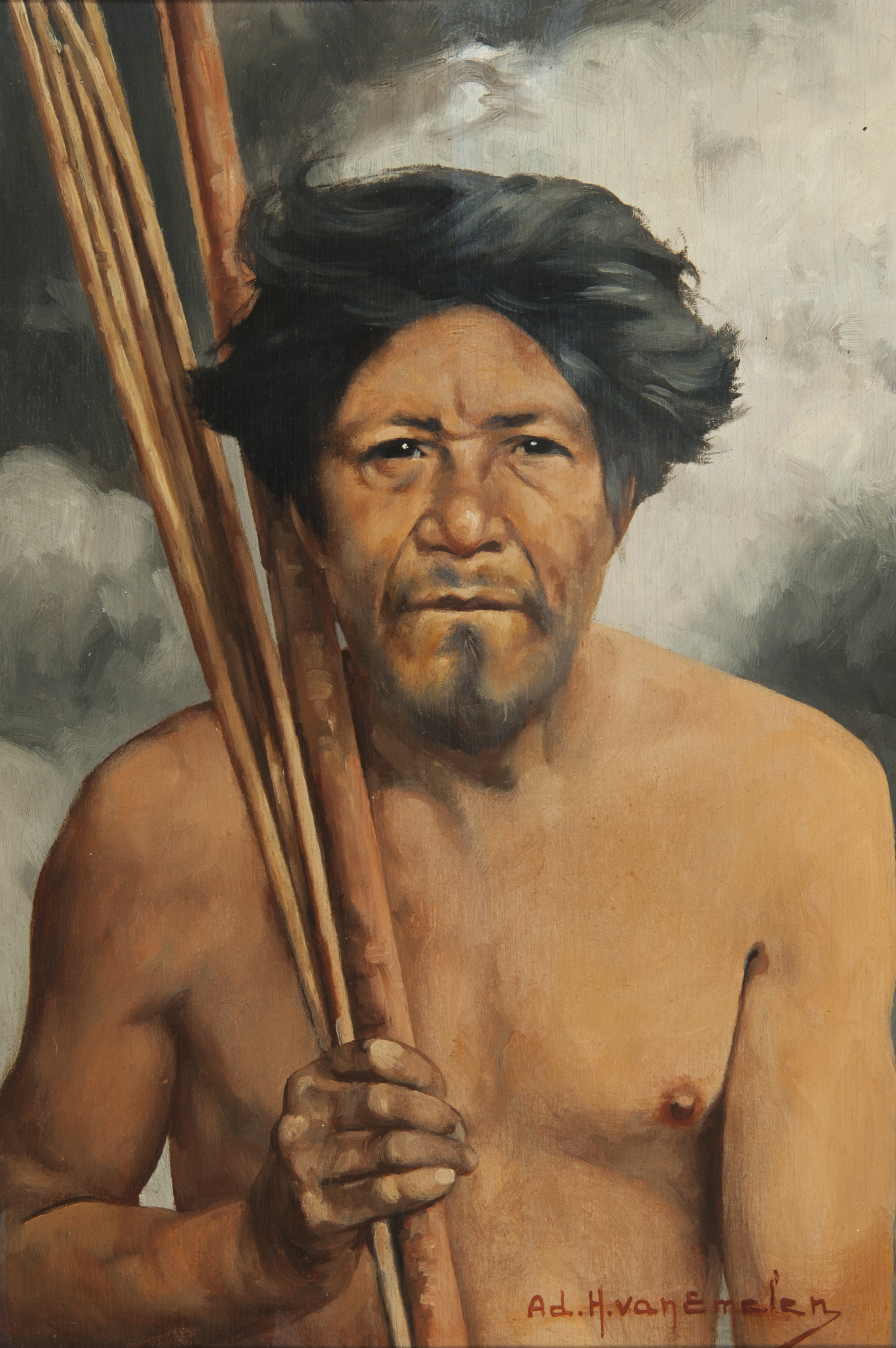 Obra que integra o acervo do Museu Paulista da USP.